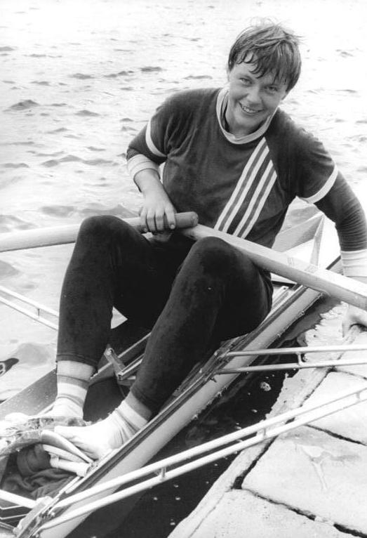 Cornelia Linse ADN-ZB Reiche 12.5.84-KL-Berlin: DDR-Meisterschaften im Rudern- Neue Titelträgerin im Einer der Damen wurde Cornelia Linse vom SC DHfK Leipzig.